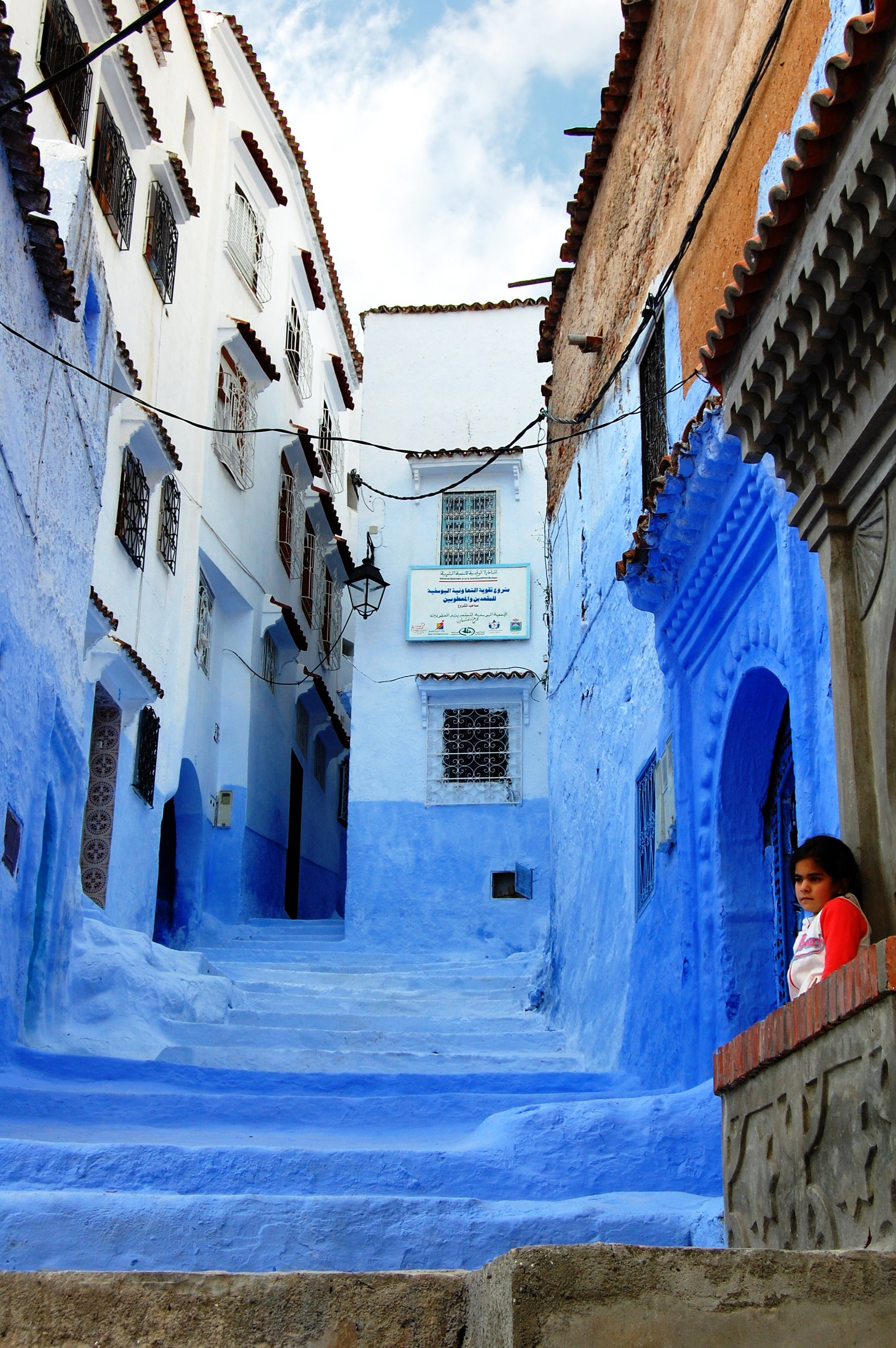 Calle de Chaouen (Marruecos).